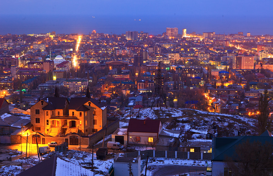 Махачкала - столица Дагестана